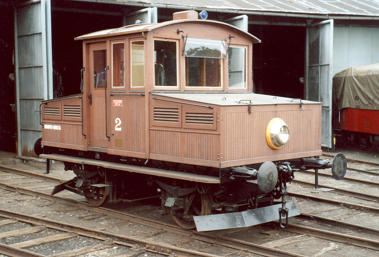 Akkulokomotive Nr. 2 im Eisenbahnmuseum Jaromer